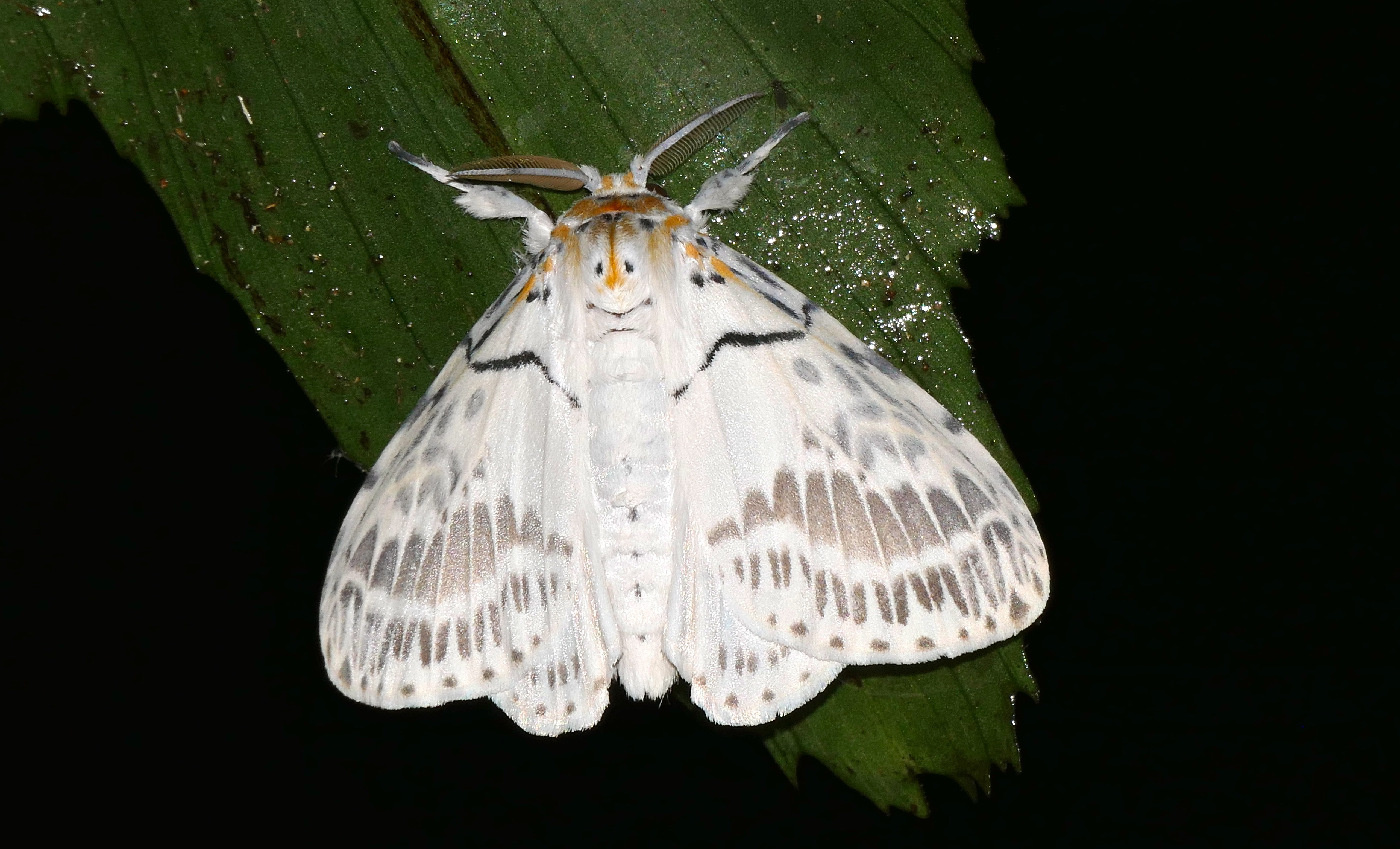 Mulu NP, Sarawak, MALAYSIA